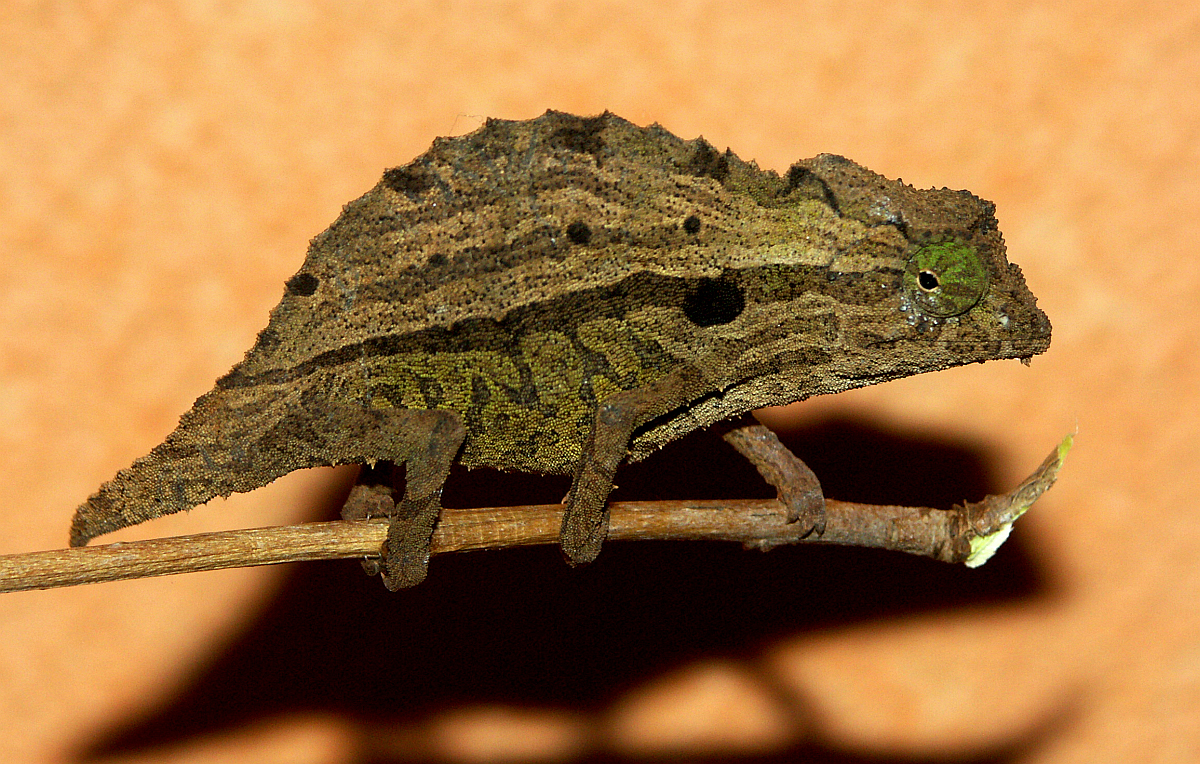 male Rieppeleon bravicaudatus